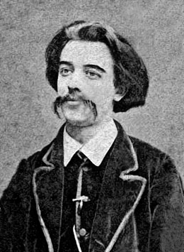 Charles de Sivry (1848-1900)